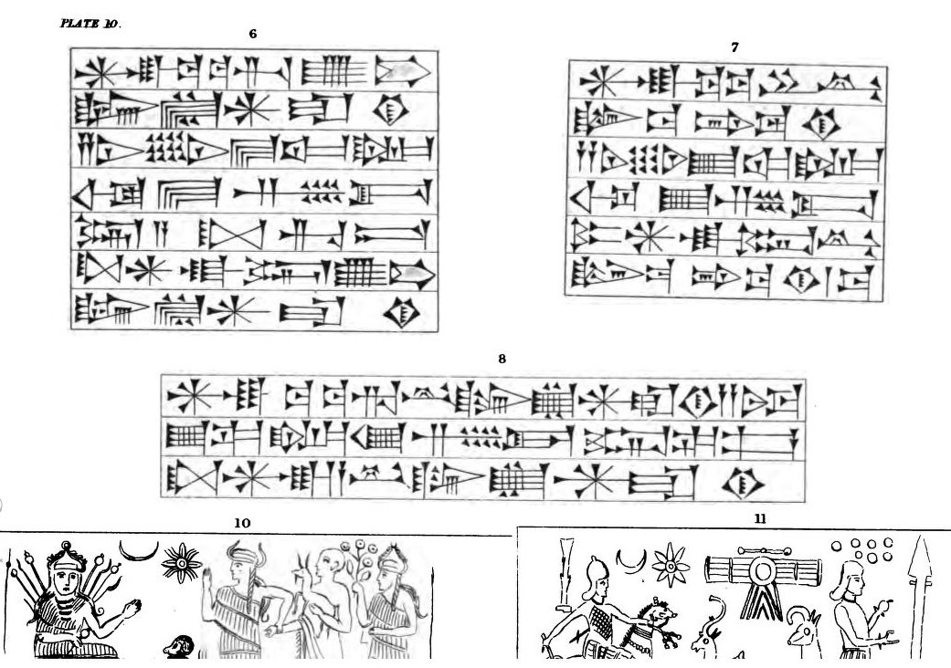 Inschriften und Abbildungen in Persepolis – Zeichnung Claudius James Rich 1821